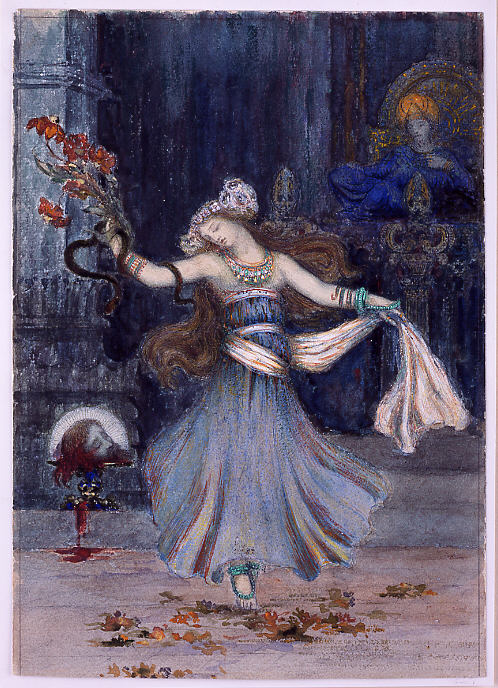 Drawing; Drawings